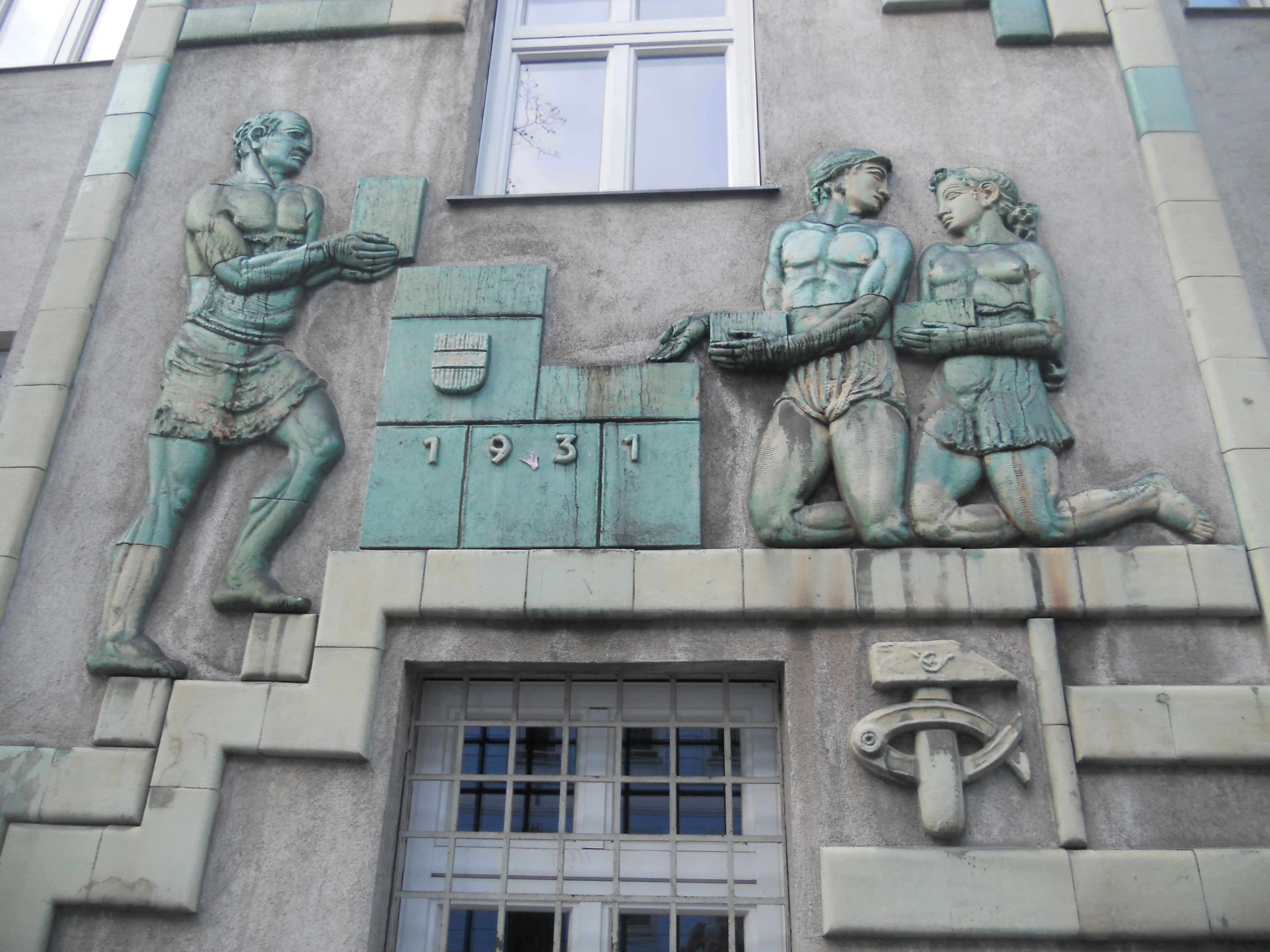 Kommunaler Wohnbau, Gerl-Hof